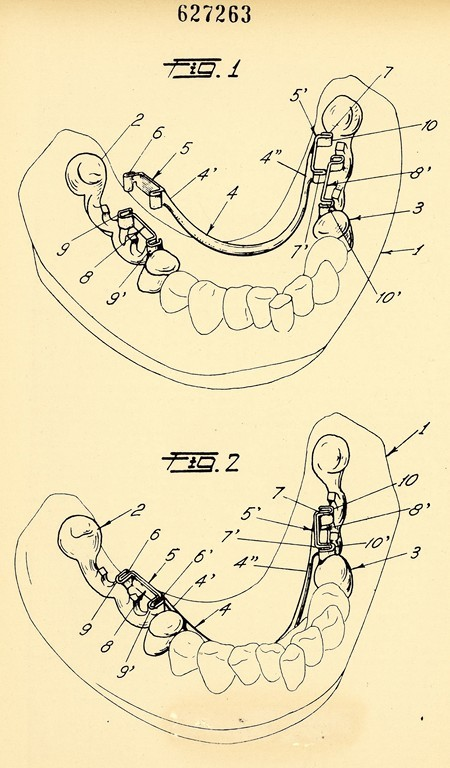 Disegno per il brevetto per invenzione industriale n. 627263, classe A 61 c, di Gian Paolo Vanelli per un dispositivo di ancoraggio di protesi parziali per dentature interrotte, Bologna. Data di deposito: 4 marzo 1960. Data di concessione: 28 ottobre 1961 (AS Genova, Ufficio provinciale industria, commercio e artigianato di Genova, Fondo Brevetti)